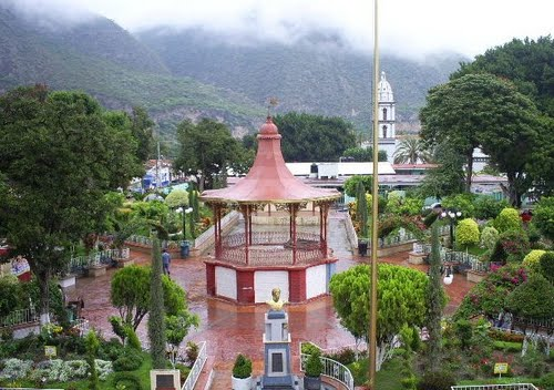 Kiosko en el Zócalo